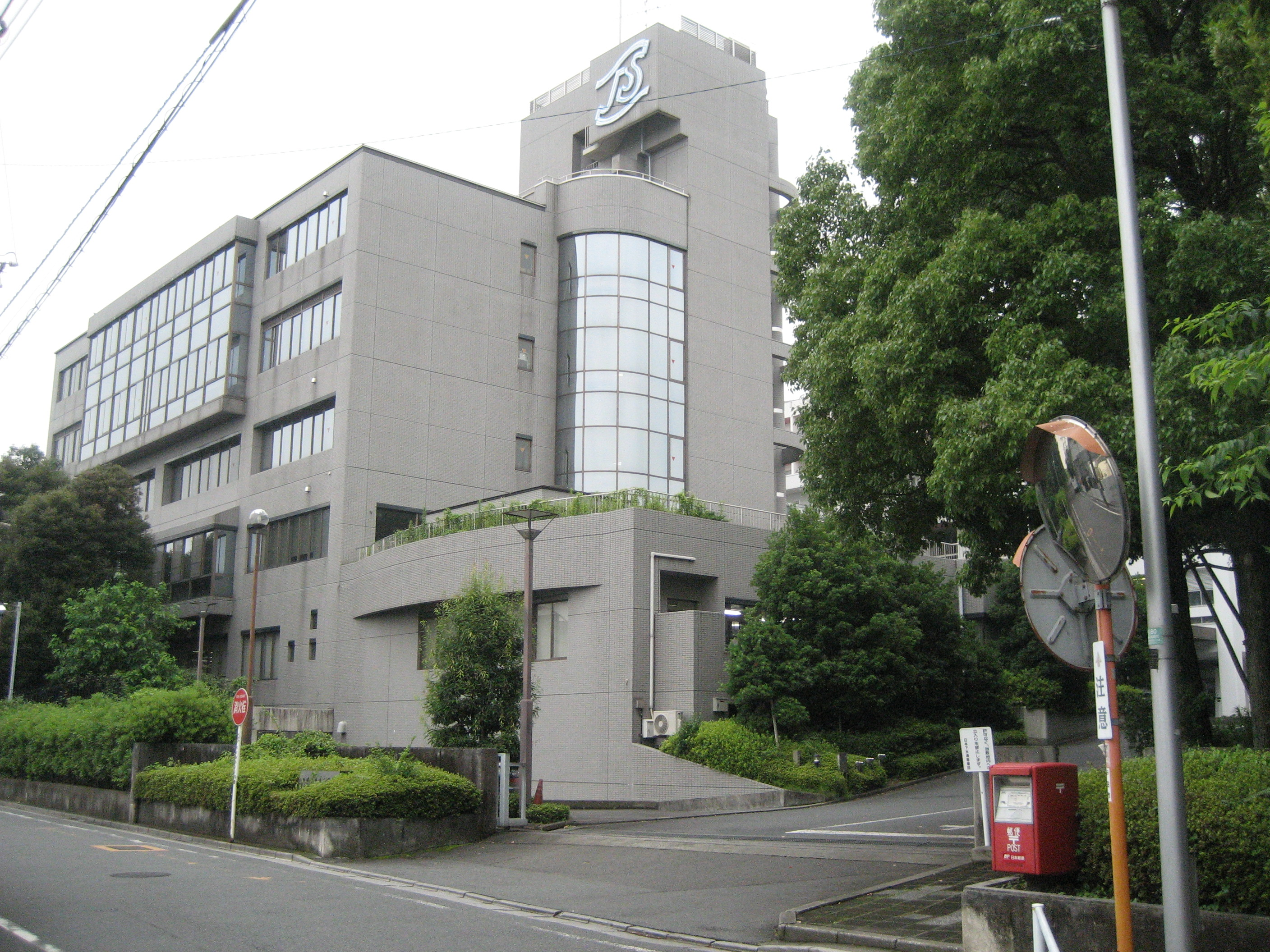 日本下水道事業団技術開発研修本部（埼玉県戸田市）